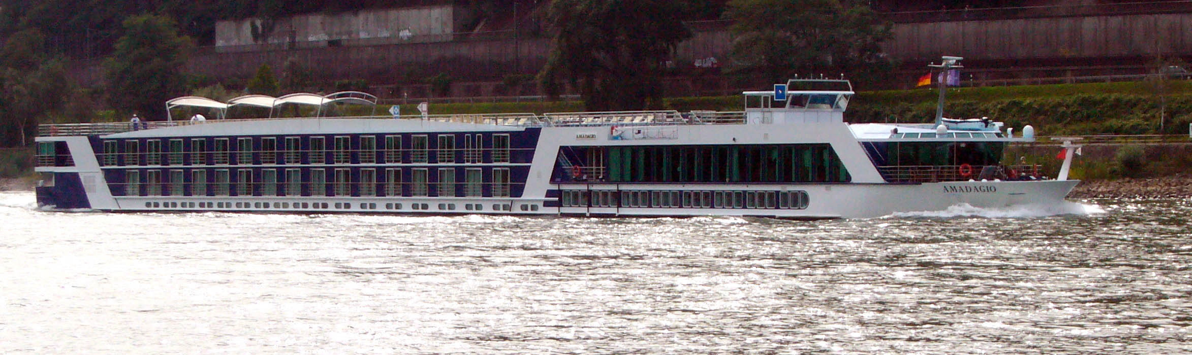 Flußkreuzfahrtschiff MS Amadagio